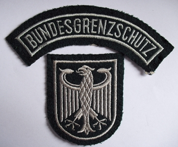 Ärmelabzeichen BGS alt Fotograf/Zeichner: Thomas Haase Sonstiges: keine Angaben